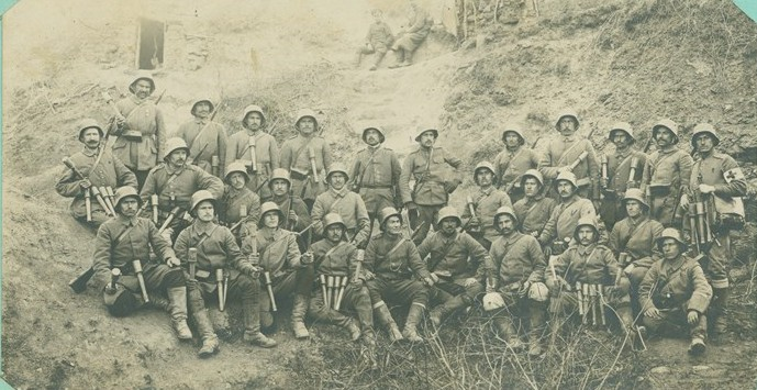 Войници от Двадесет и осми пехотен стремски полк.